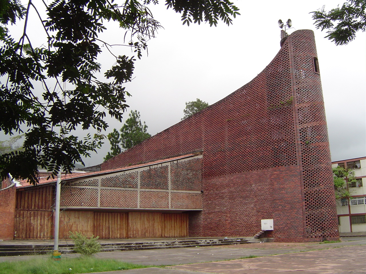 IGLESIA DIVINO REDENTOR Ubicada en la plaza principal de la Unidad Vecinal en San Cristóbal, estado Táchira en Venezuela. Obra moderno del Arquitecto Venezolano José Fructoso Vivas Vivas (Fruto Vivas), en el año 1957.